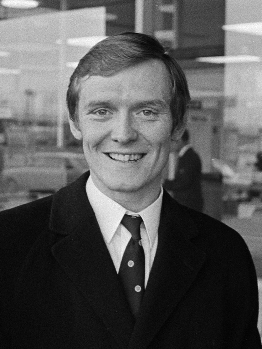 Aankomst van het voetbalelftal van Celtic uit Glasgow, Schotland op Schiphol voor de wedstrijd tegen Ajax; Davie Hay 9 maart 1971